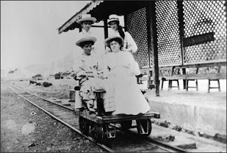 Trolley of the Barbados Railway